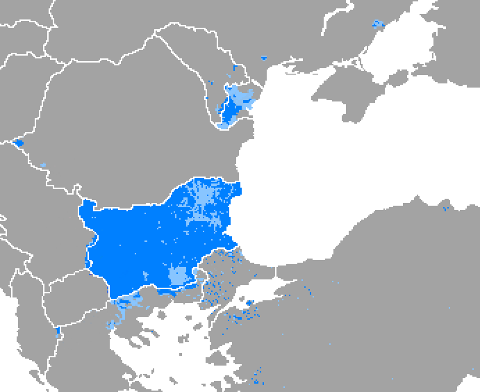 Idioma búlgaro